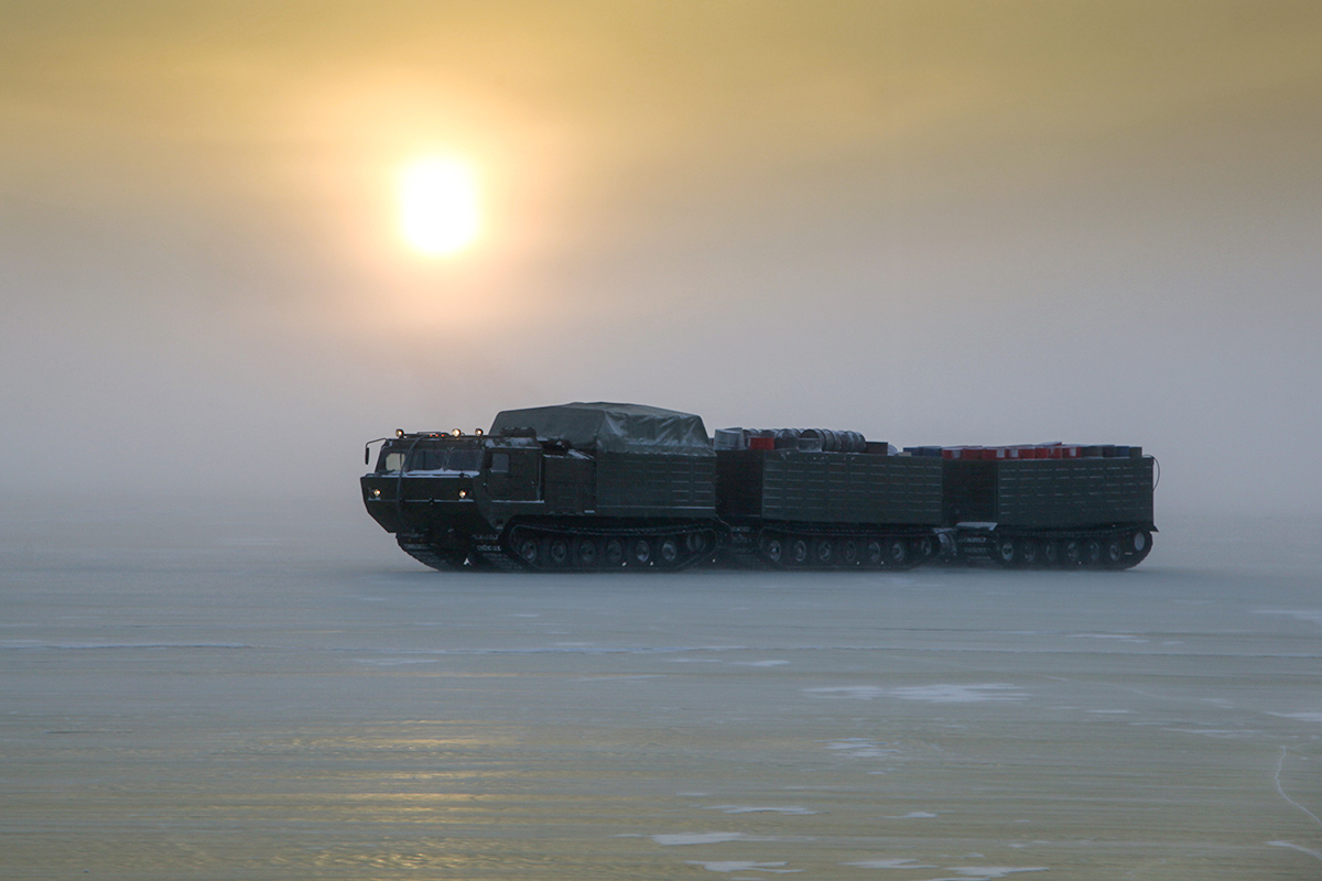 Испытания новых и перспективных образцов вооружения, военной и специальной техники в условиях Арктики